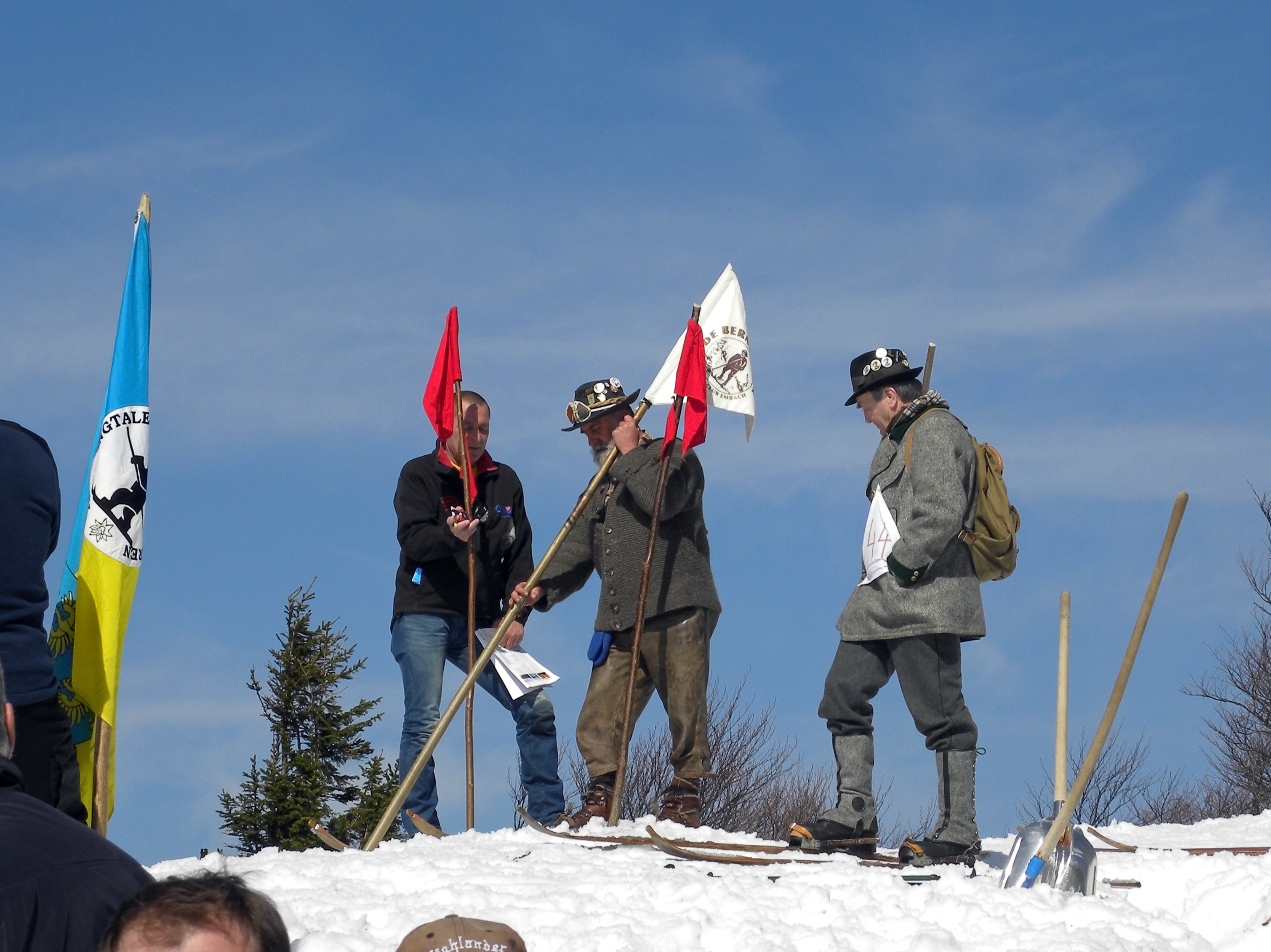 Auch die Zeitnehmung erfolgt händisch beim Nostalgieschilauf.